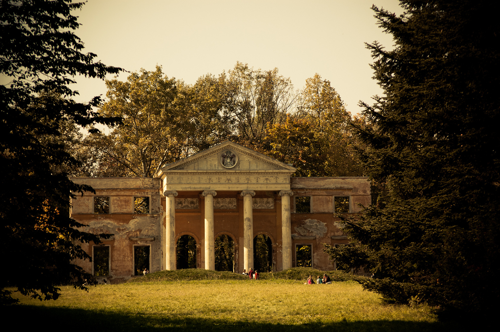 Habsburg kastély megmaradt középrésze (Alcsútdoboz, Arborétum) This is a photo of a monument in Hungary. Identifier: 14952